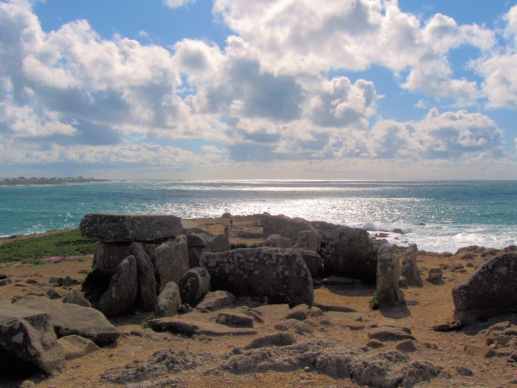 Dolmen von Pointe de la Torche, Finistère